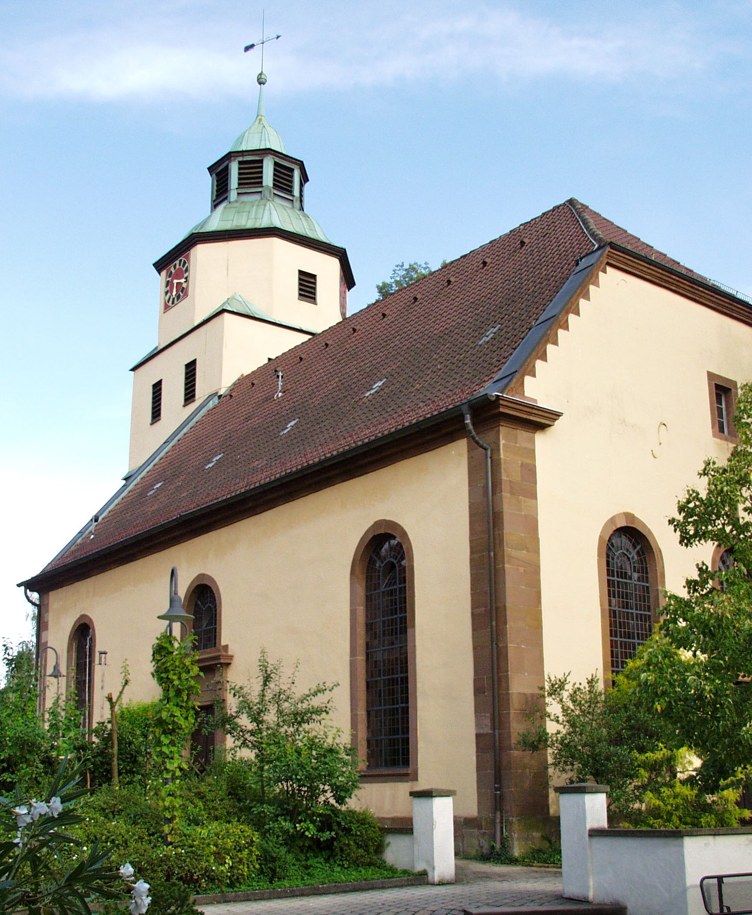 Evangelische Kirche Plüderhausen